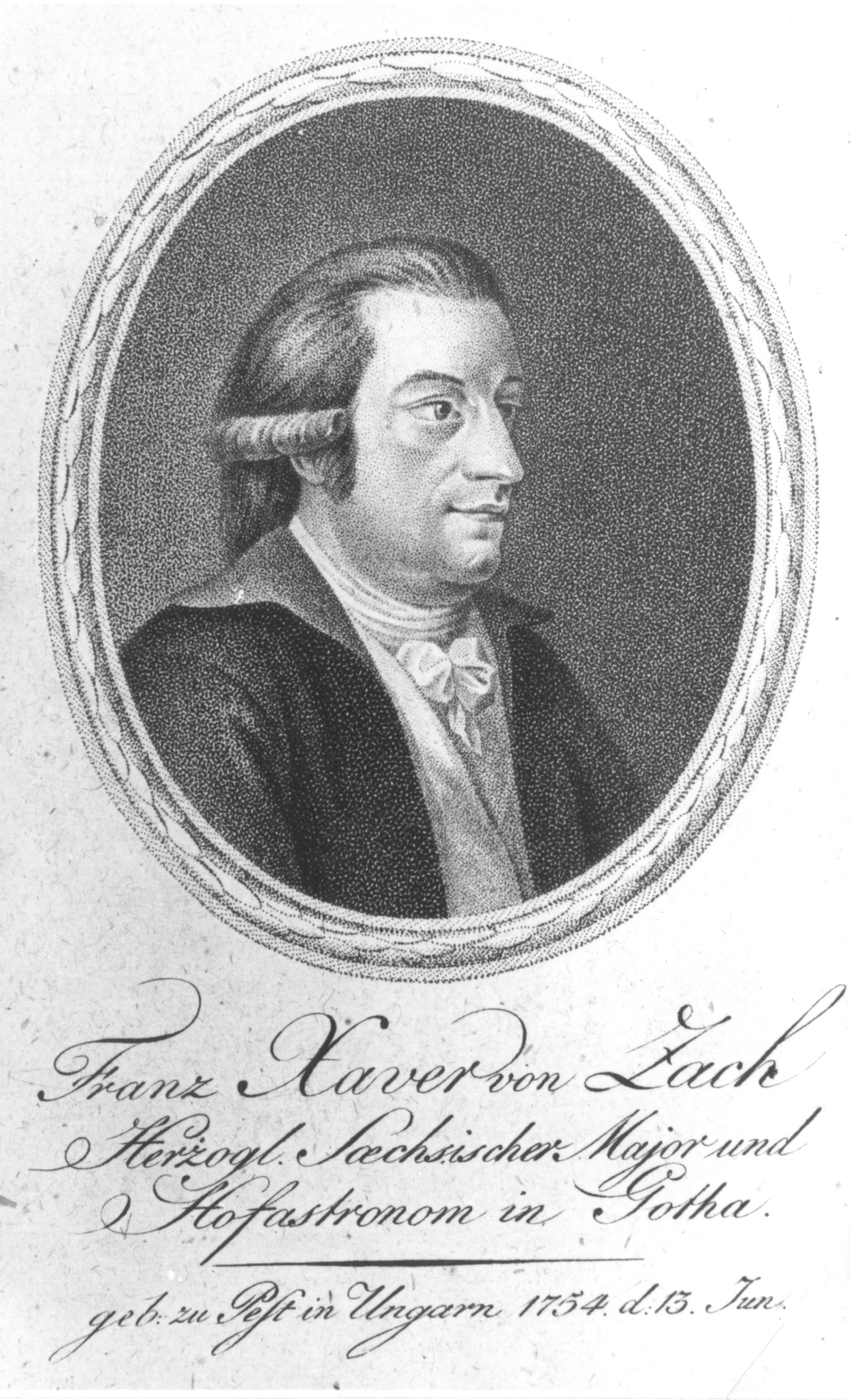 Franz Xaver von Zach Bild aus Monatl.Correspondenz 1800 gemeinfrei